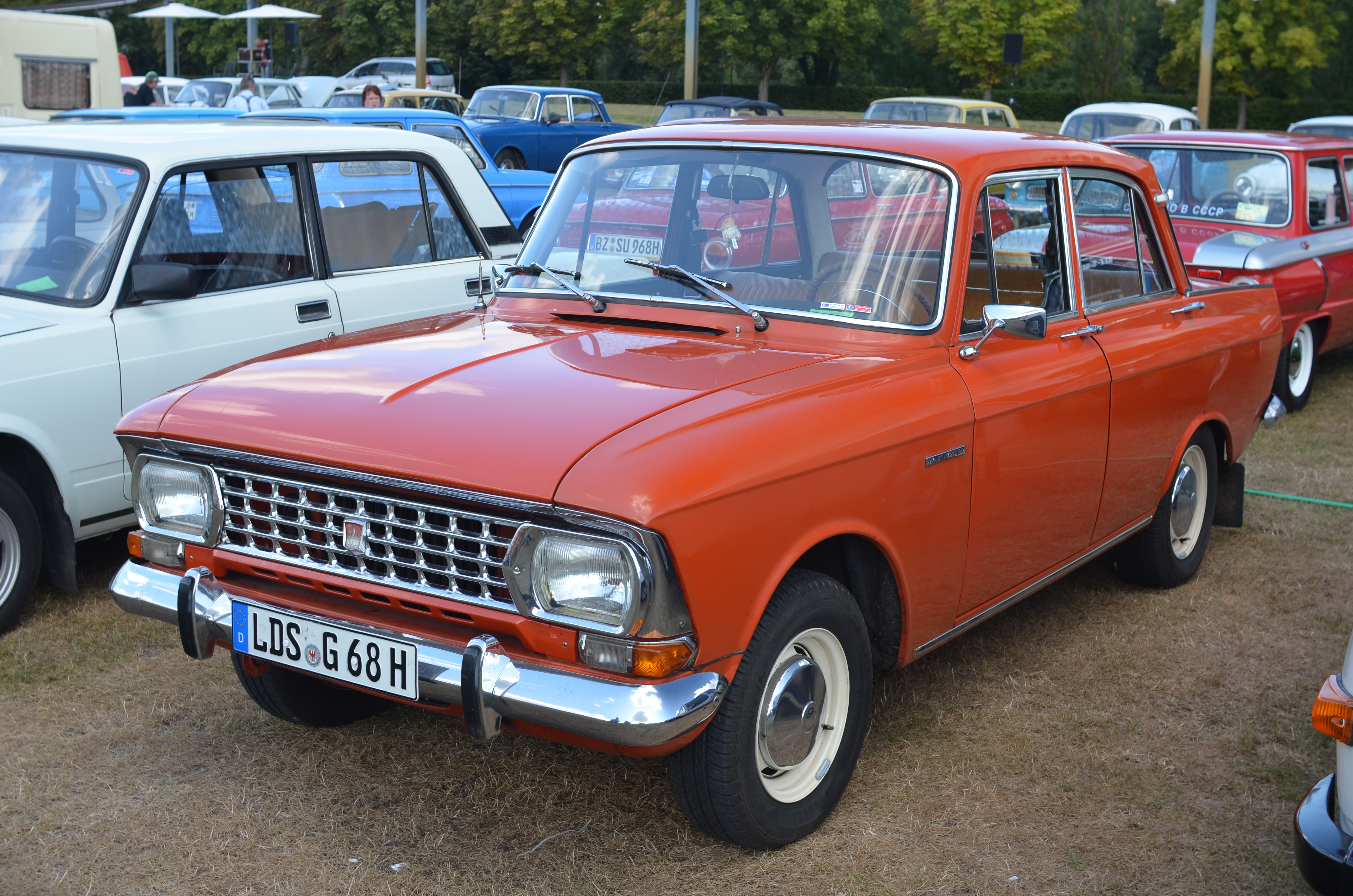 Moskwitch